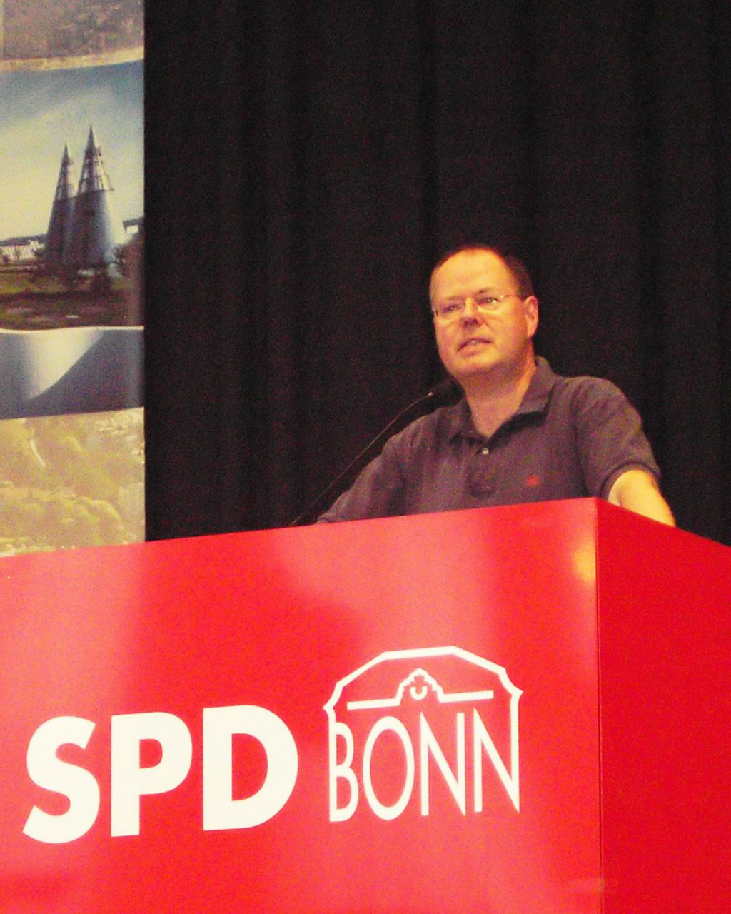 Peer Steinbrück, NRW-Ministerpräsident a.D.